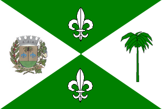 Bandeira de Macaubal - SP - Brasil.